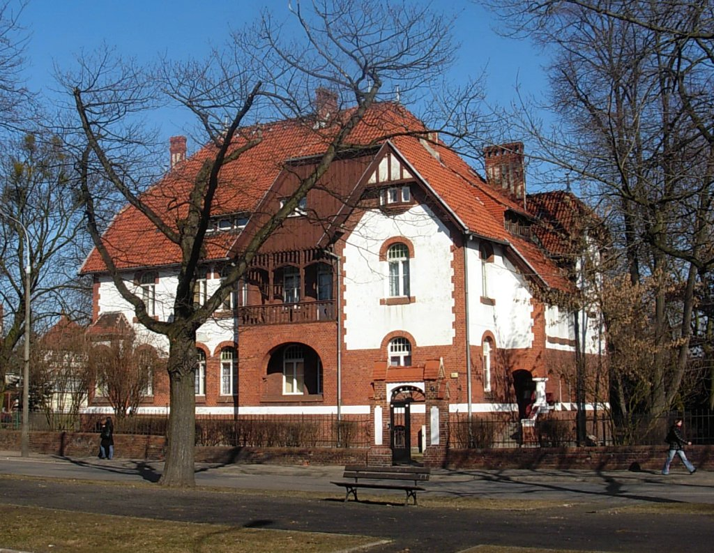 Instytuty Rolnicze w Bydgoszczy